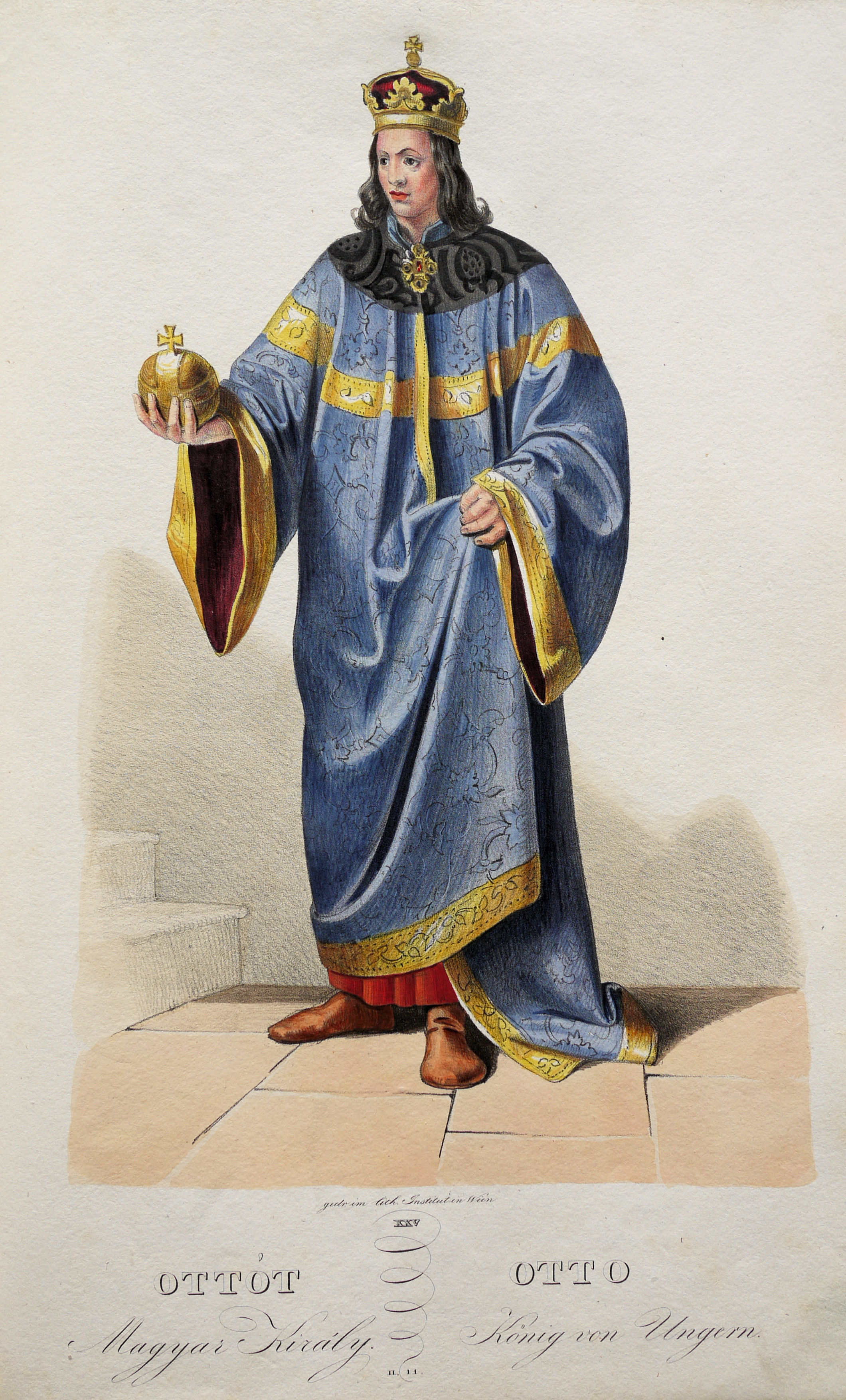 Otto III. von Bayern (1261-1317), als Bela V. König von Ungarn. Lithographie von Josef Kriehuber nach einer Zeichnung von Moritz von Schwind aus Ungerns Erste Heerführer Herzoge und Koenige In einer Reihe von Bildnissen von Bela bis auf Seine Majestät Franz I. Kaiser Von Österreich König Von Ungern &c., &c. Wien : Lithographisches Institut ;ca. 1828